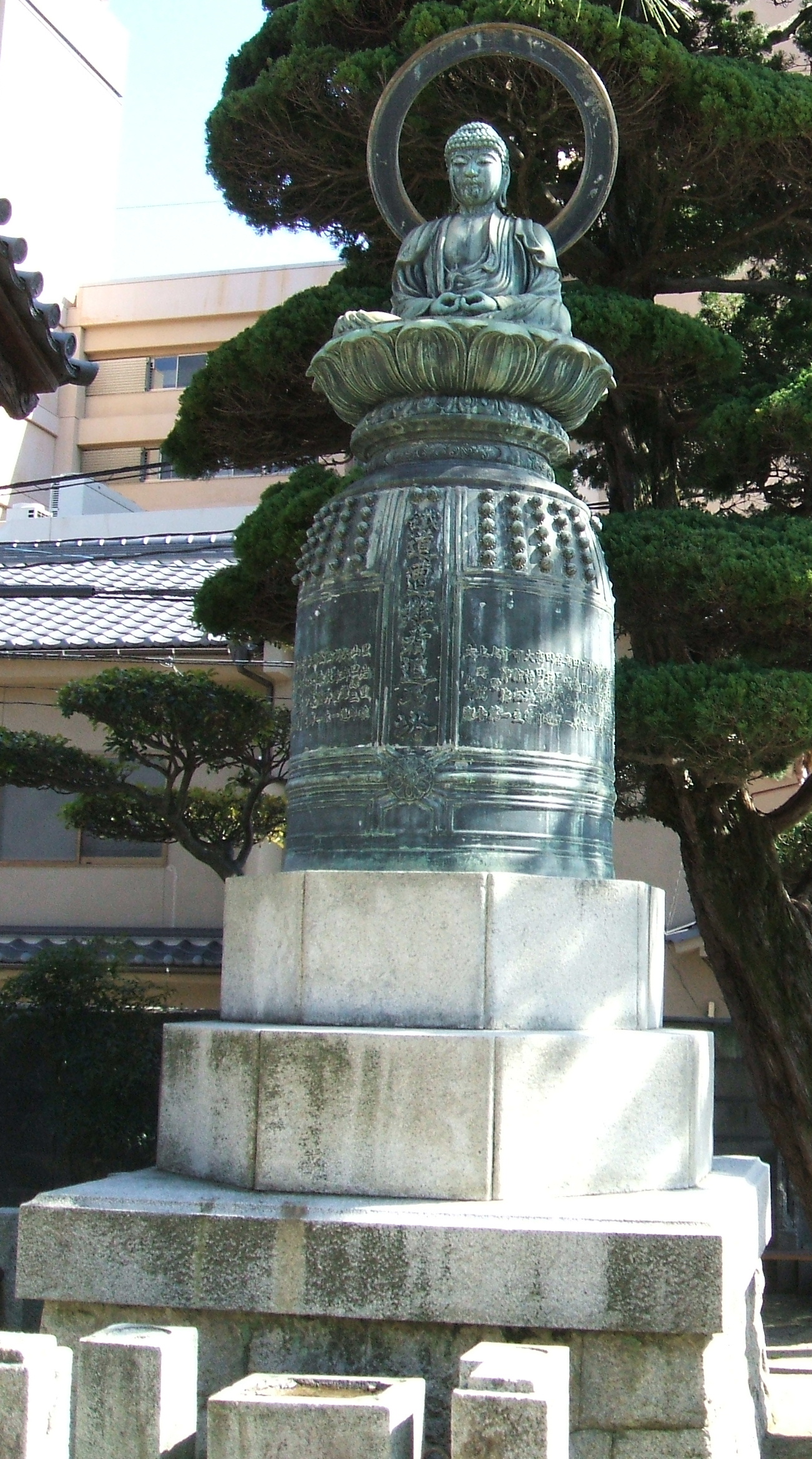 広島県広島市安芸区の専念寺の鉄道事故慰霊碑。1925年9月のの犠牲者を悼み建立。投稿者が撮影。